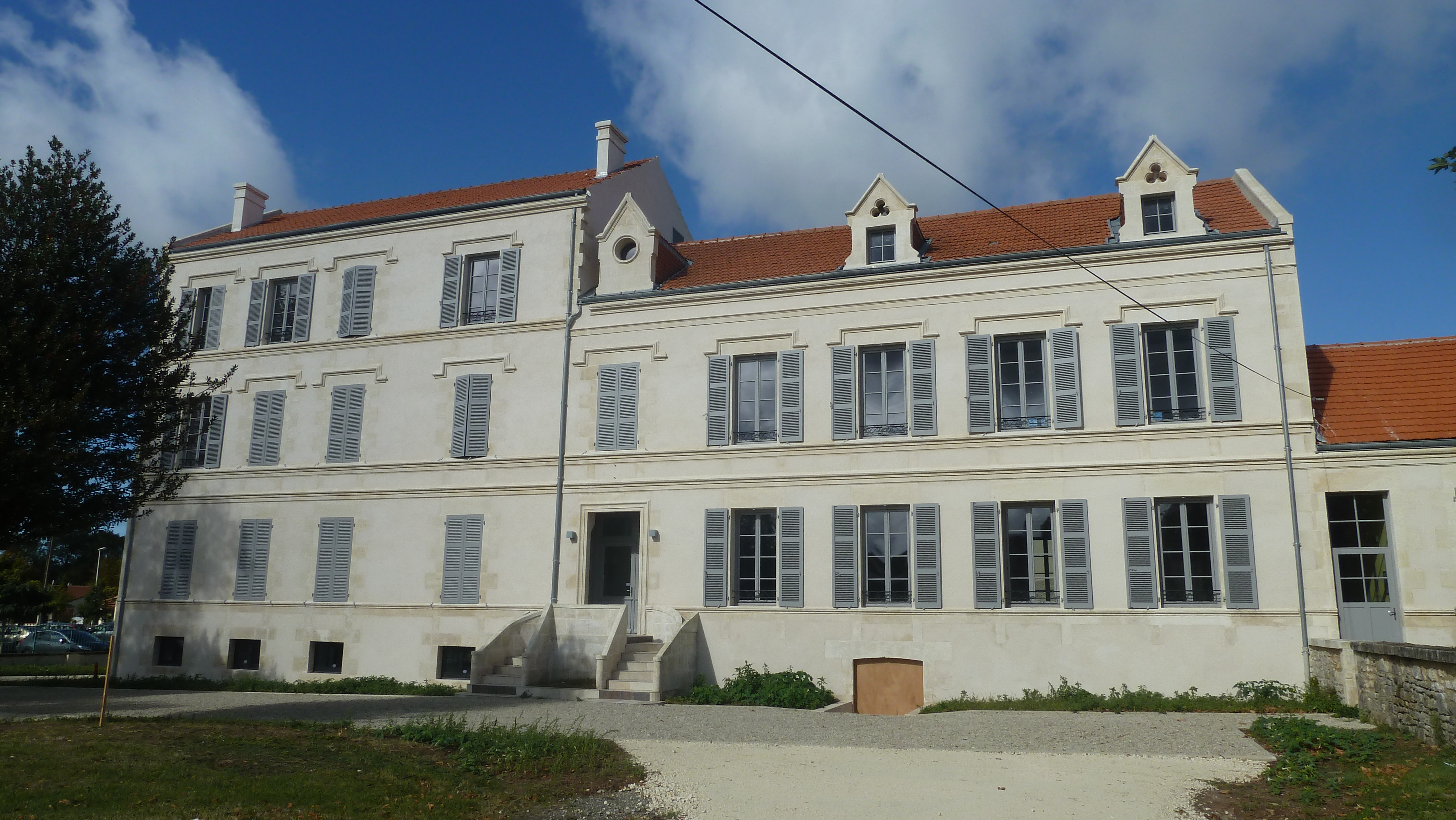 depuis 2012 on y trouve rassemblé l'école de musique,l'administration de l'Office de Tourisme,de nombreuses salles de réunion ...